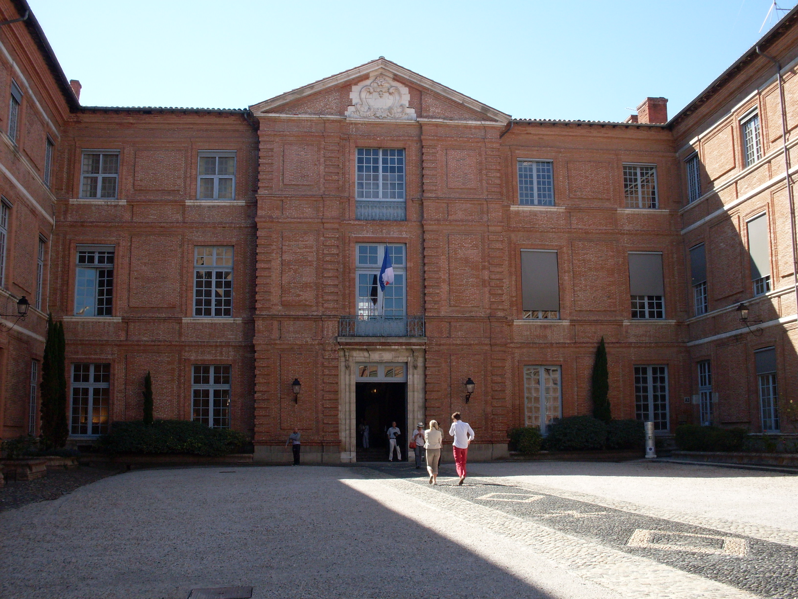 Préfecture de Toulouse dans la première cour.